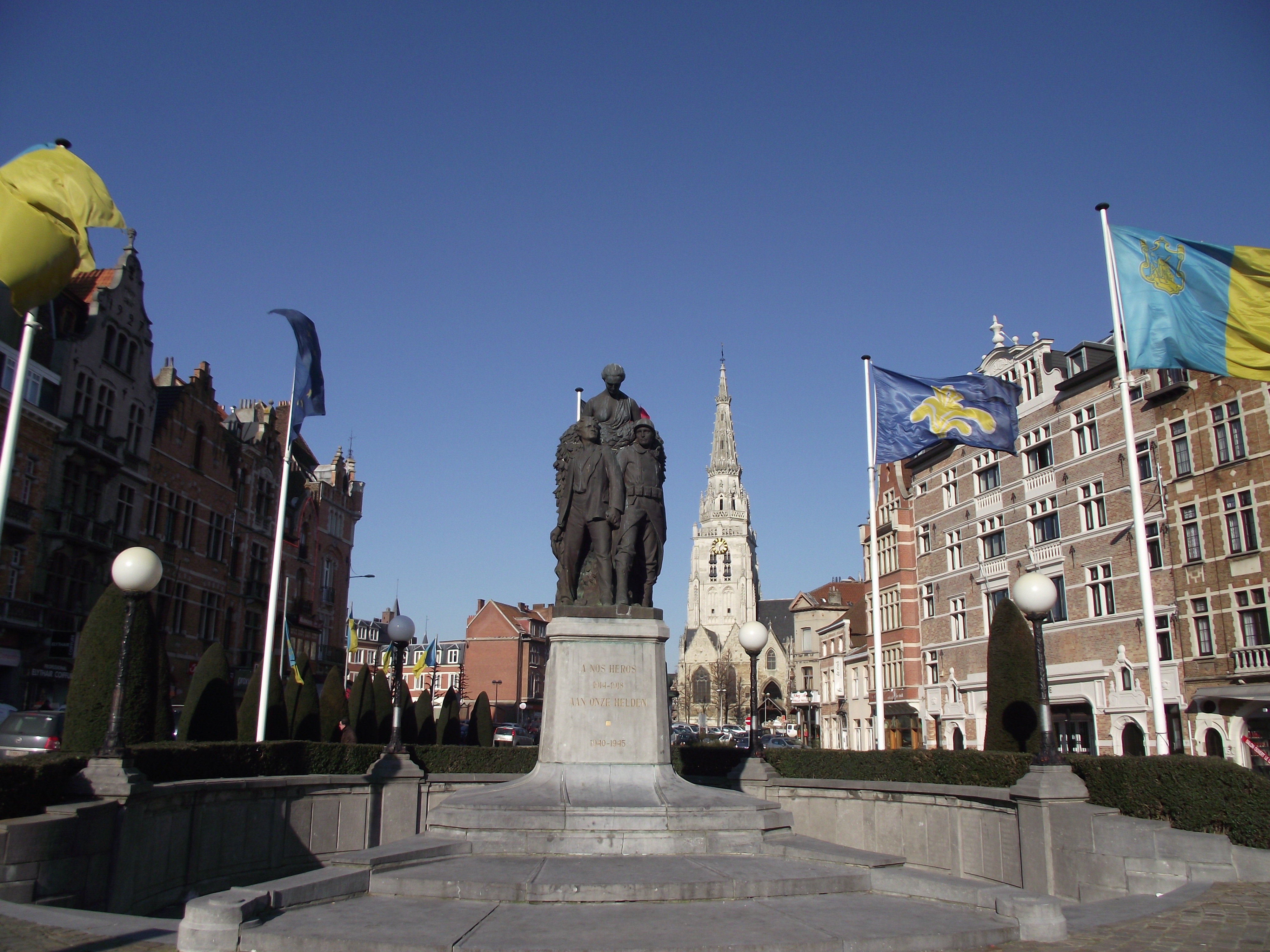 Anderlecht, Dapperheidsplein